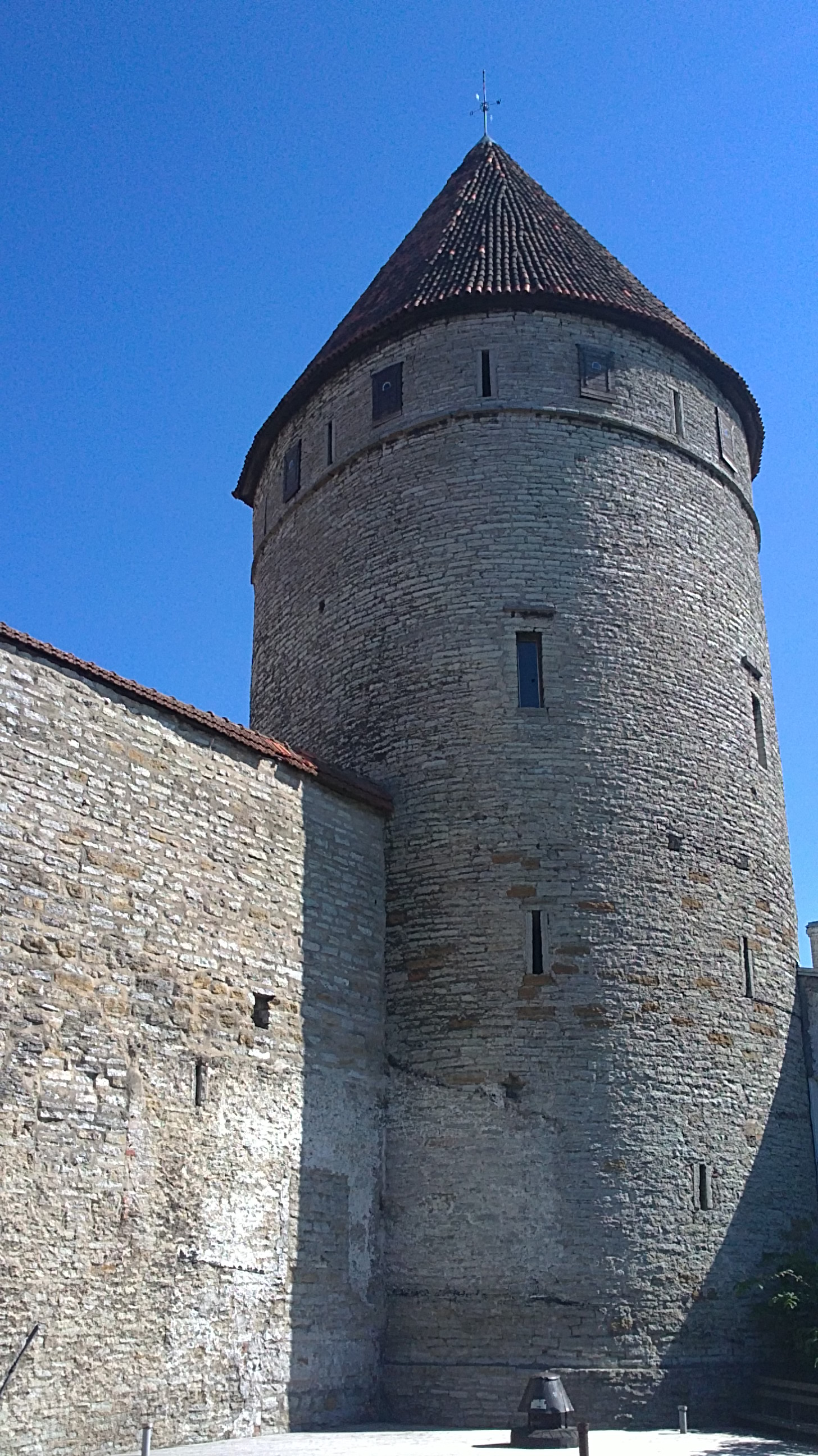 Tallinna linnamüüri Kuldjala torn, vaade Tornide väljakult